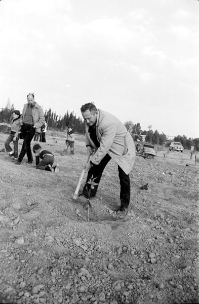 בצלאל גבר נוטע את העציץ הראשון בעומר בטו בשבט תשל"ה 1975